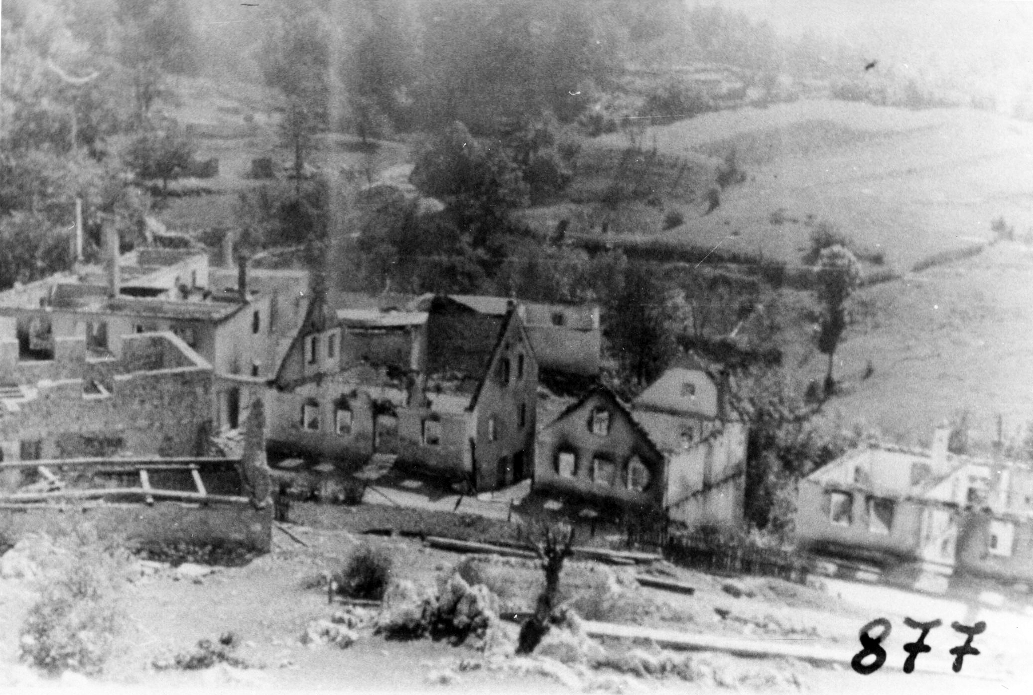 Srpskohrvatski / српскохрватски: Spaljena Drežnica oktobra 1942. godine, nakon italijanske ofanzive.